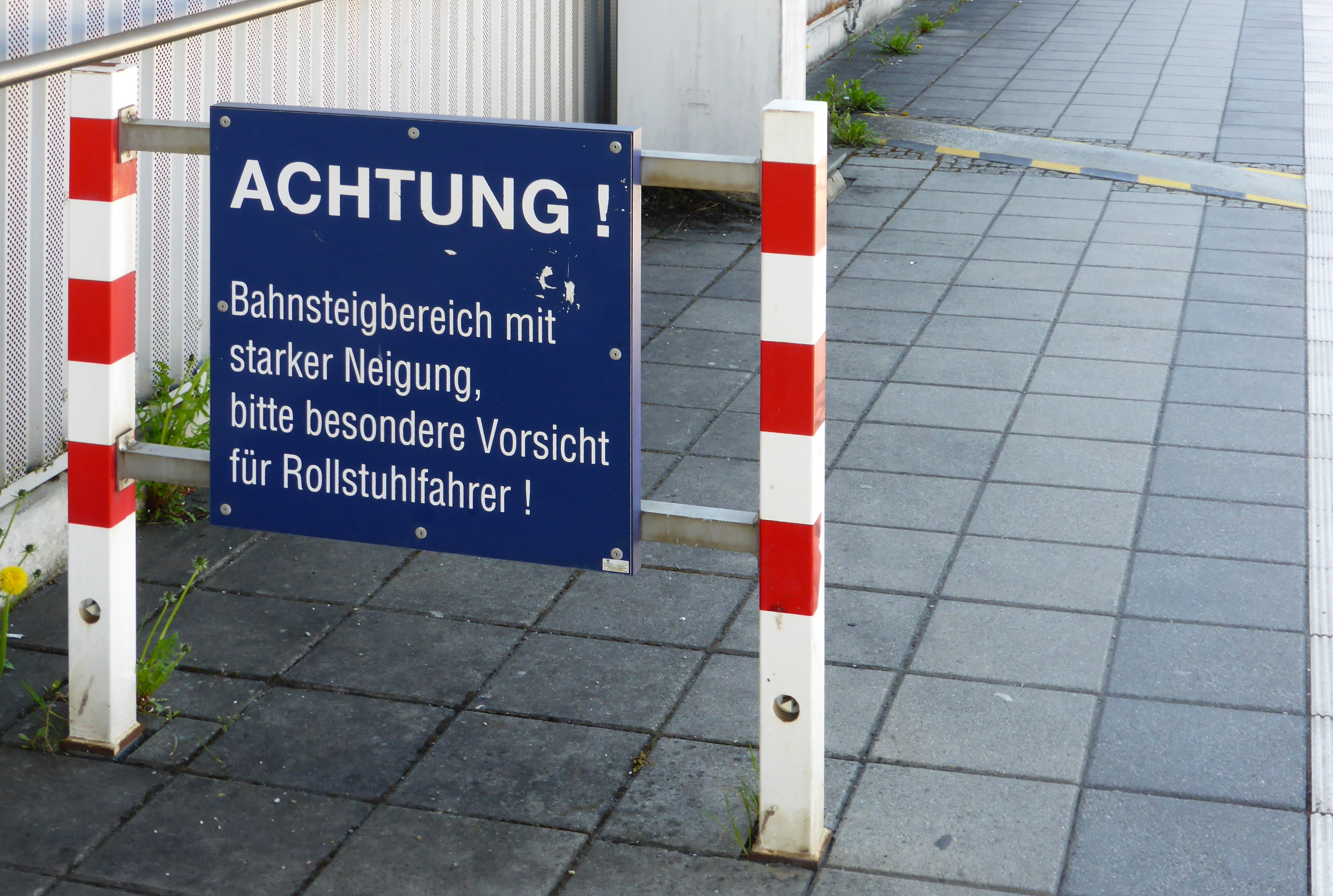 Die Bahnsteige vor der Einfahrt zum Audi-Tunnel in Ingolstadt Nord sind stark geneigt und daher mit Querschwellen ausgestattet.